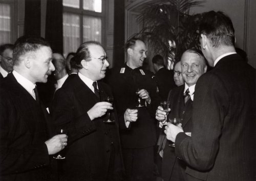 Tweede Wereldoorlog. Een bijeenkomst van belanghebbenden op het gebied van vreemdelingenverkeer. Aan de borrel Mr. J. Linthorst-Homan, Dr.H.M. Hirschfeld, oudminister L.N. Deckers en Dr. T. Goedewaagen (op de rug gezien). Nederland, Den Haag ('s-Gravenhage), 5 April 1941.